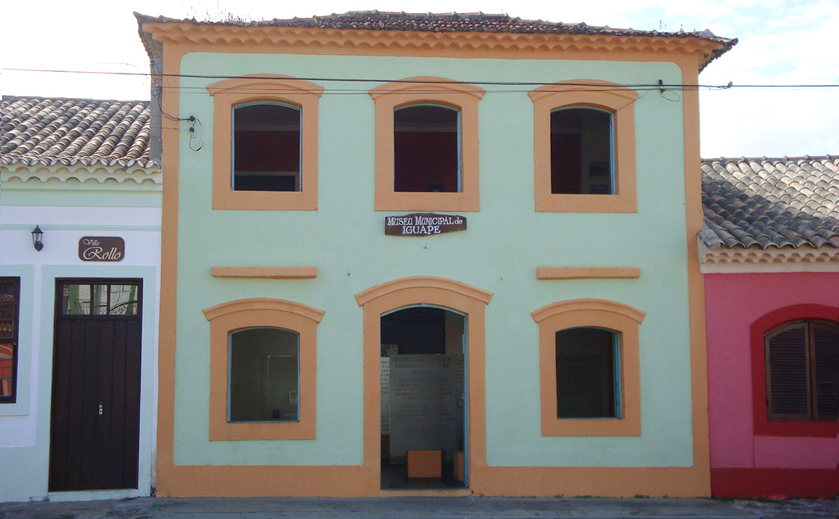 O prédio onde funcionava a Casa de Fundição ainda existe atualmente, ocupado pelo Museu de Iguape, depois de ter sido usado sucessivamente como cadeia, quartel e Casa da Câmara. Está magnificamente restaurado e é o mais antigo edifício fazendário do Brasil.